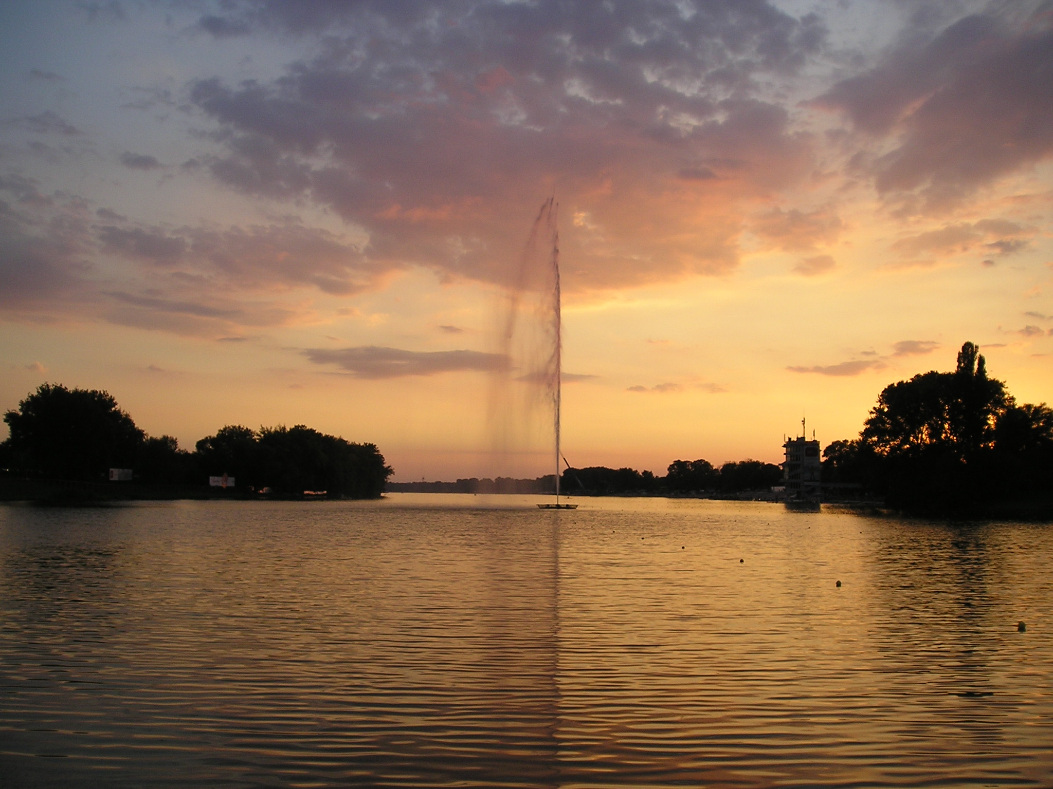 Ada Ciganlija